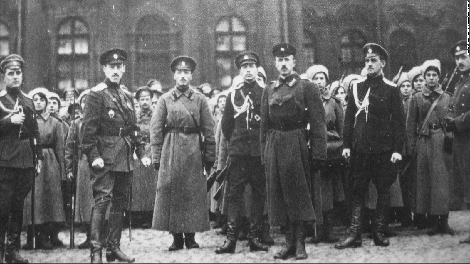 Batallón de la Muerte desfilando delante del Palacio de Invierno.